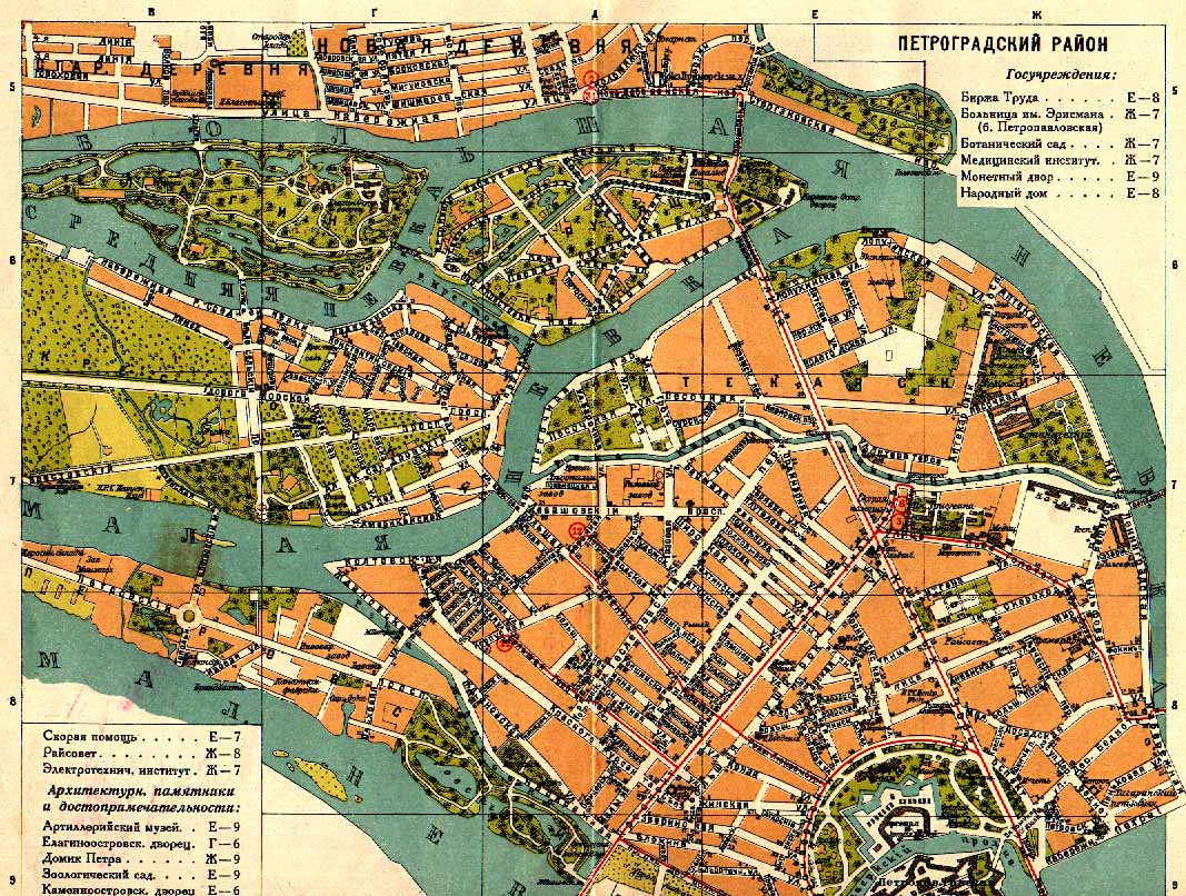 Древняя карта Петроградской стороны С.Петербурга